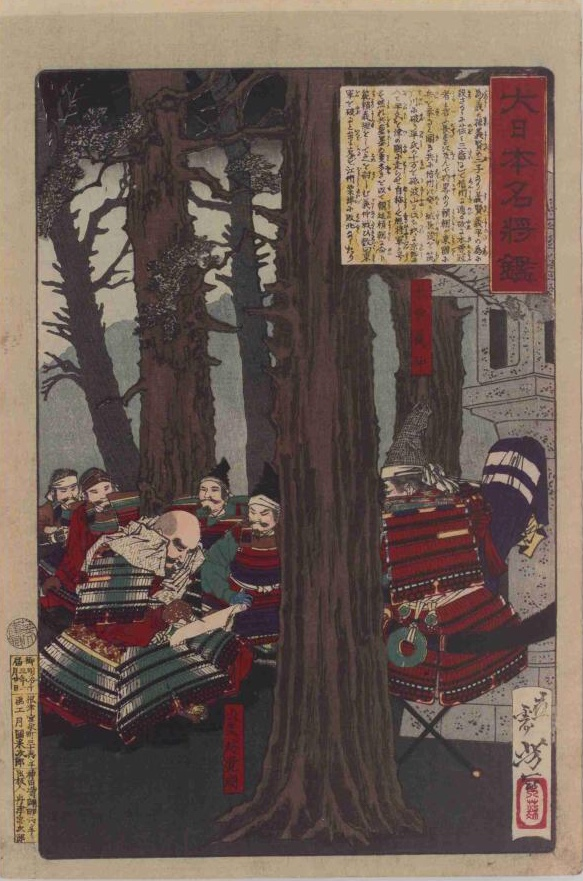 大日本名将鑑 木曽義仲 大夫坊覚明